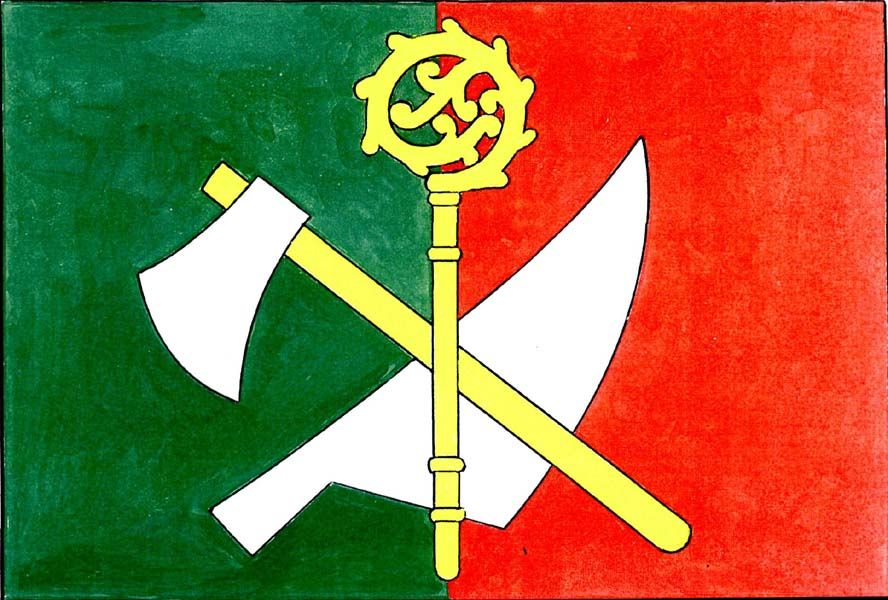 Česky: vlajka obce Doloplazy